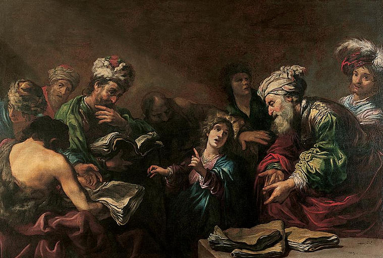 Jésus parmi les docteurstitle QS:P1476,fr:"Jésus parmi les docteurs" label QS:Lfr,"Jésus parmi les docteurs"